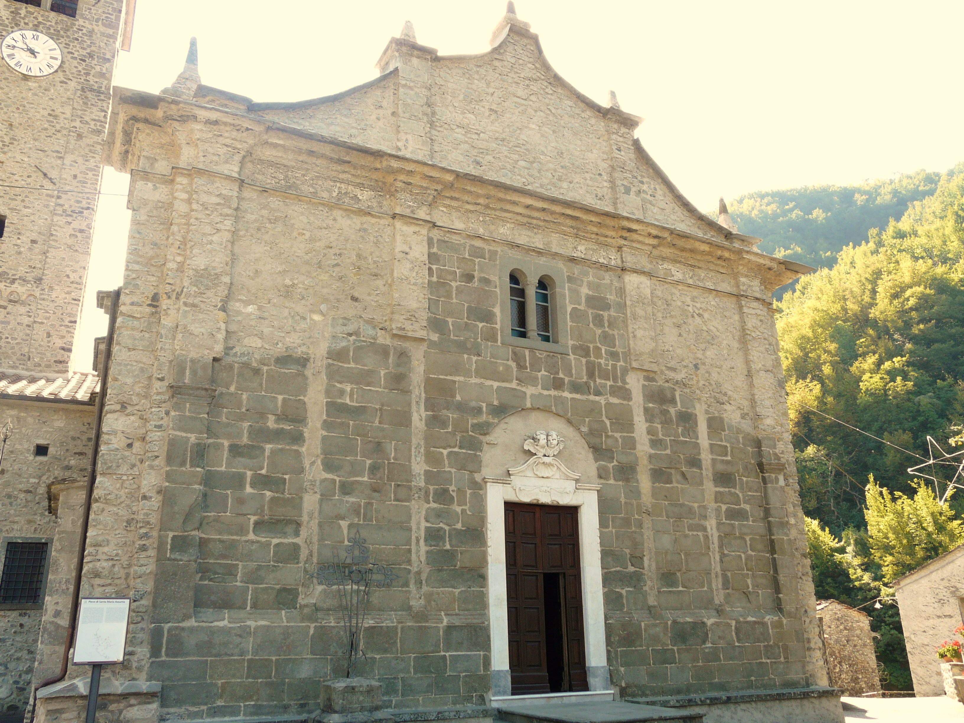 Pieve di Santa Maria Assunta, Crespiano, Comano, Toscana, Italia